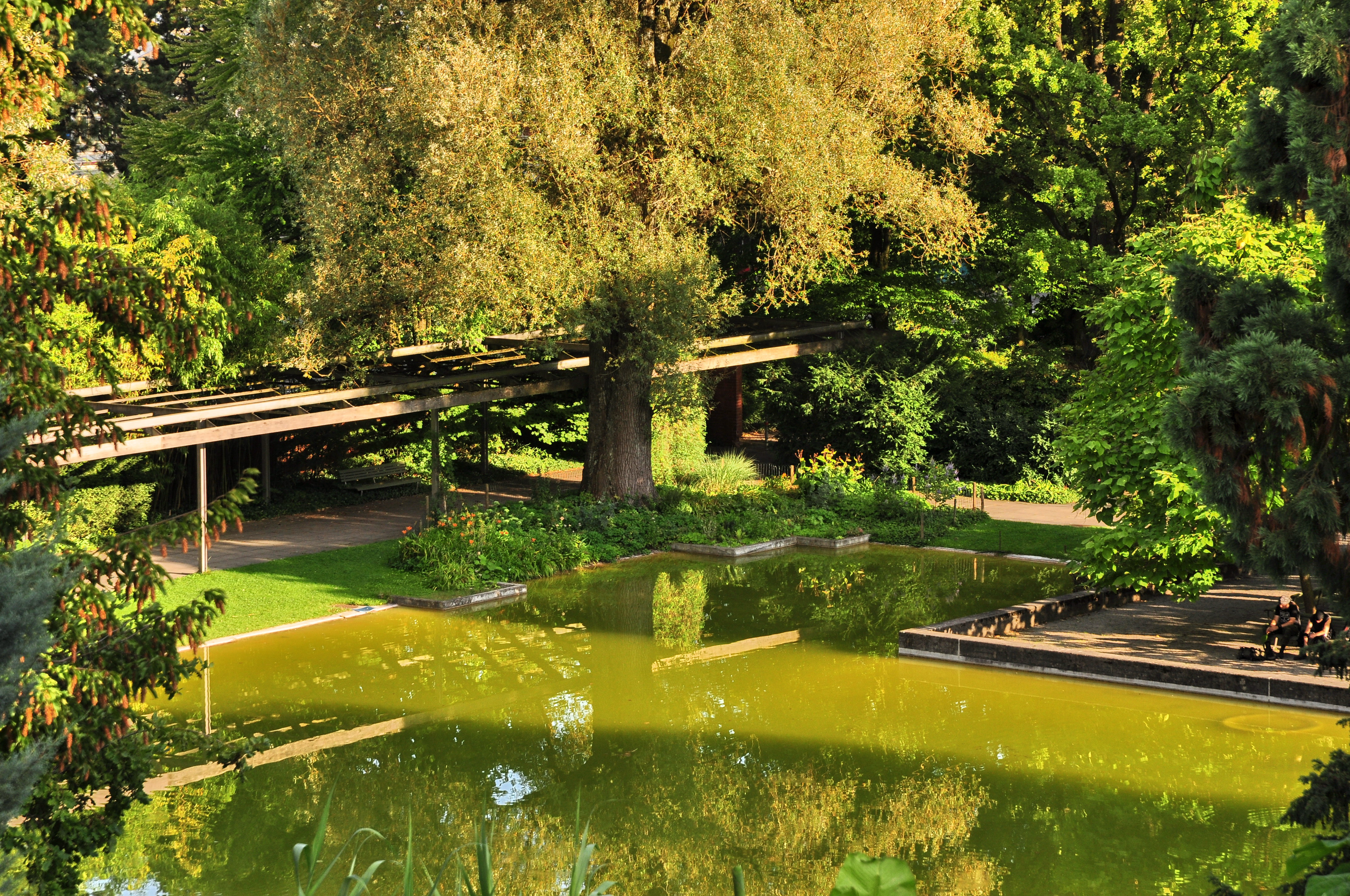 Belvoirpark in Zürich-Wollishofen (Switzerland)